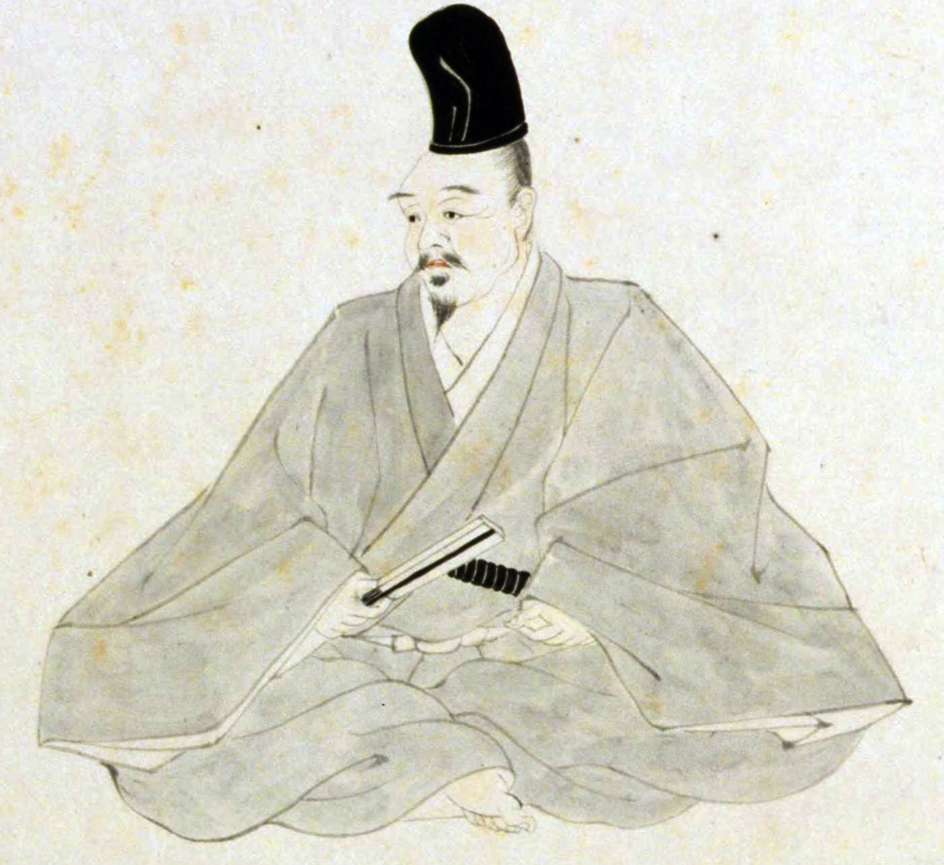 江戸後期における大舘宗氏の肖像画の一つ。